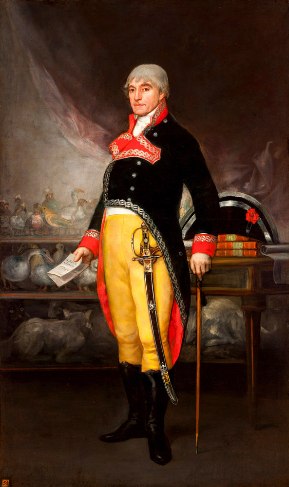 Retrato del militar y explorador español Félix de Azara (1742-1821), que también fue ingeniero, cartógrafo, antropólogo, humanista y naturalista.